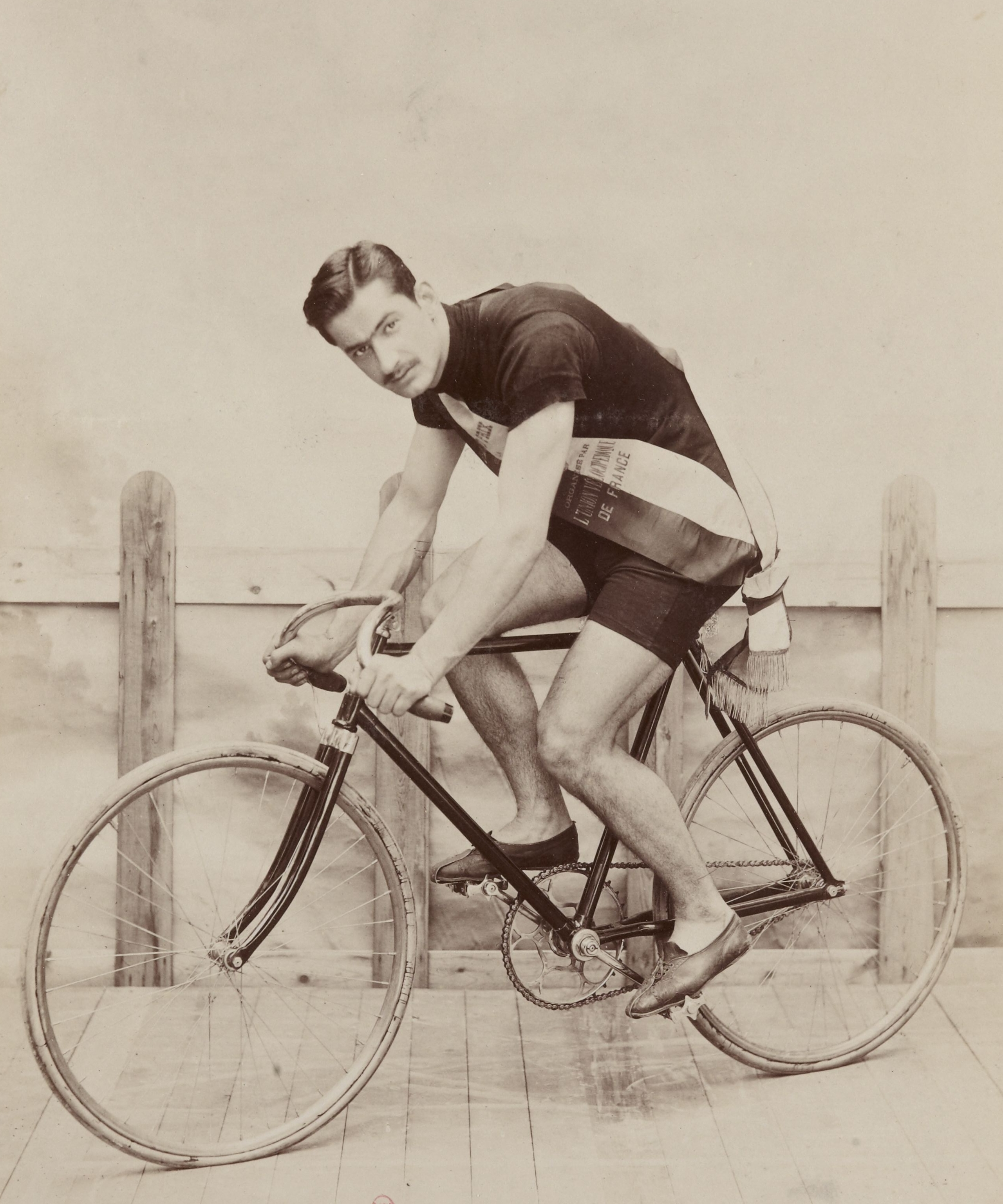 [Collection Jules Beau. Photographie sportive] : T. 11. Années 1898, 1899 et 1900 / Jules Beau : F. 21. Tommaselli, italien, gagnant du Grand Prix de Paris, 1899